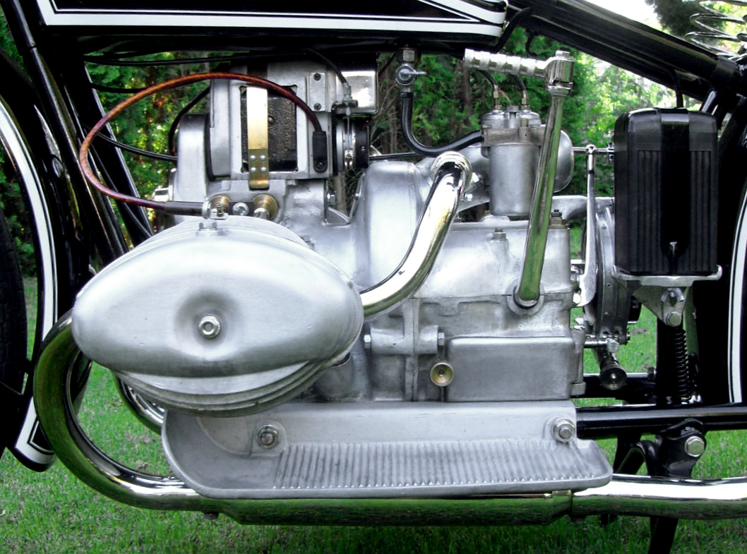 BMW R 47 Motor von links. Sammlung Volker Scherer.